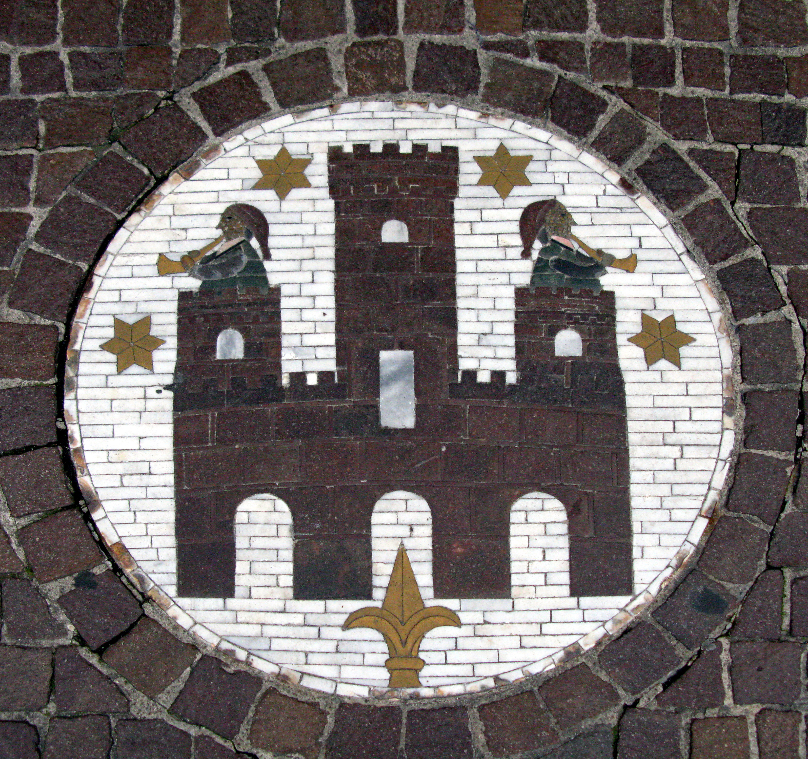 Mosaik mit dem Wasserschlössle, ein Freiburger Symbol, was auf Amtssiegeln und Kanaldeckeln zu finden ist